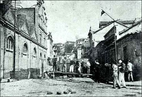 Barricada no bairro da Saúde, no Rio de Janeiro, durante a Revolta da Vacina.